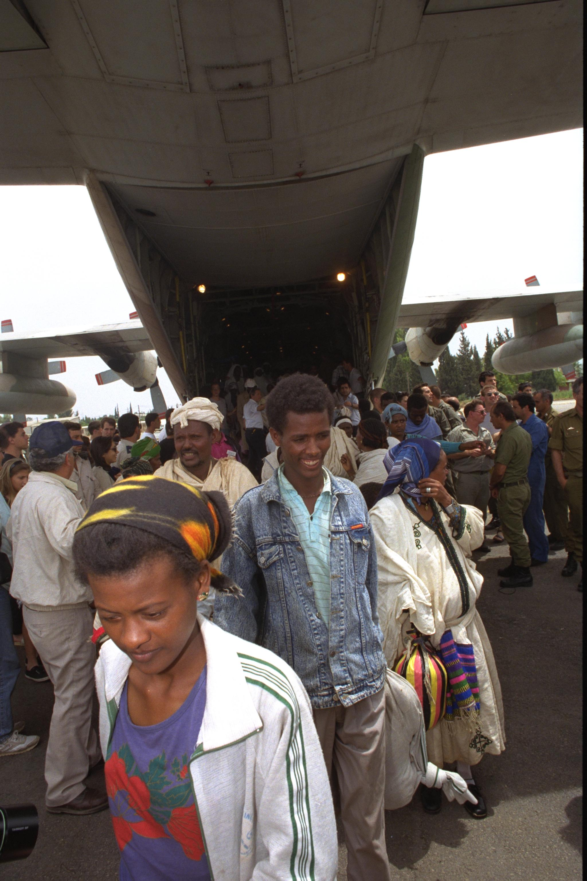 LINE OF ETHIOPIAN IMMIGRANTS STREAMING OUT OF THE BELLY OF A HERCULES, WALKING TOWARDS BUSES, OPERATION SOLOMON, AT AN AIR FORCE BASE. "מבצע שלמה" להעלאת יהודי אתיופיה לישראל. בצילום, עולים חדשים ביציאתם ממטוס ההרקולס שהביאם לישראל. Photograph: ISRAELI TSVIKA, GPO. 25/05/1991